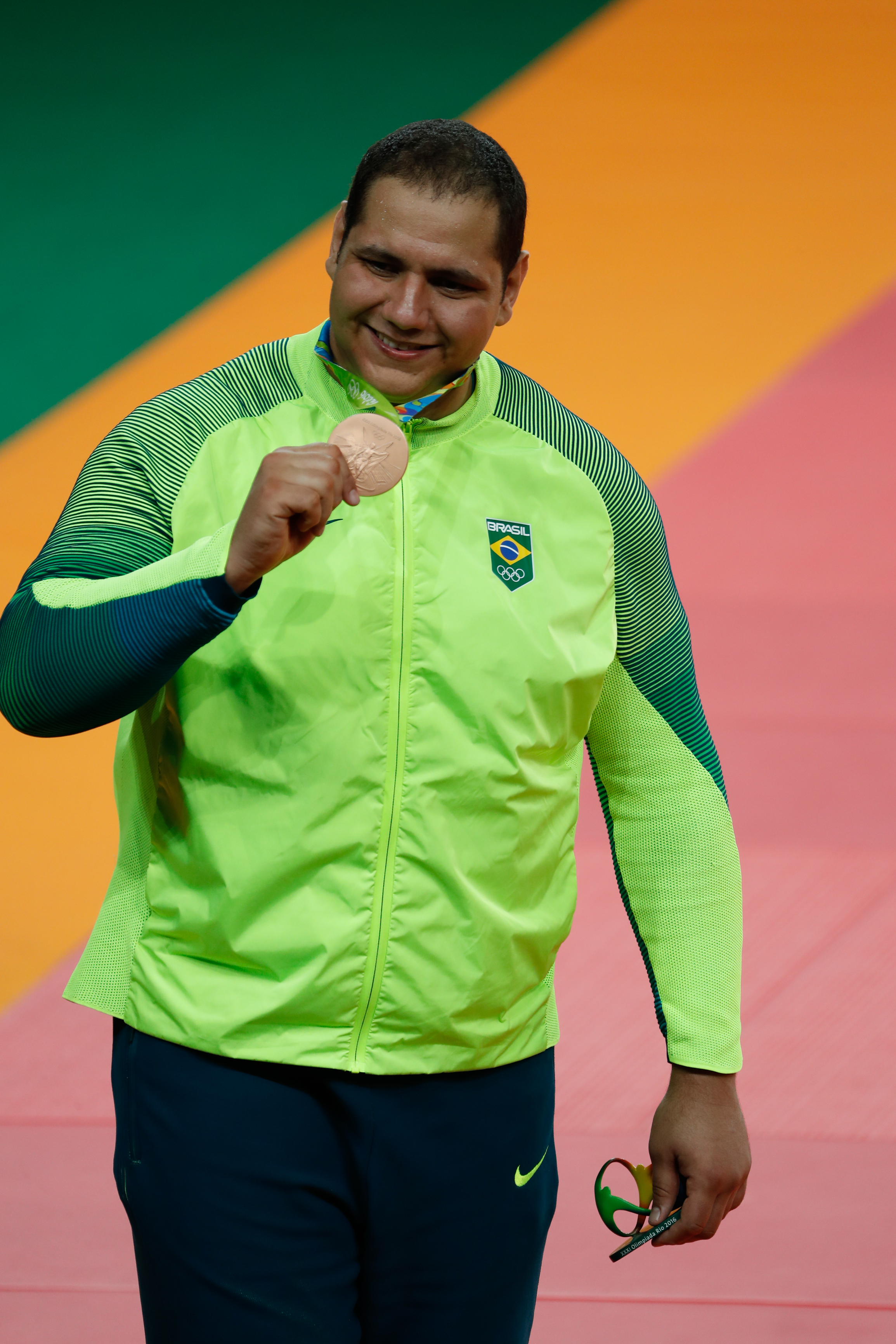 Rio de Janeiro - Judoca Rafael Silva, o Baby ganha medalha de bronze nos Jogos Olímpicos Rio 2016 (Fernando Frazão/Agência Brasil)